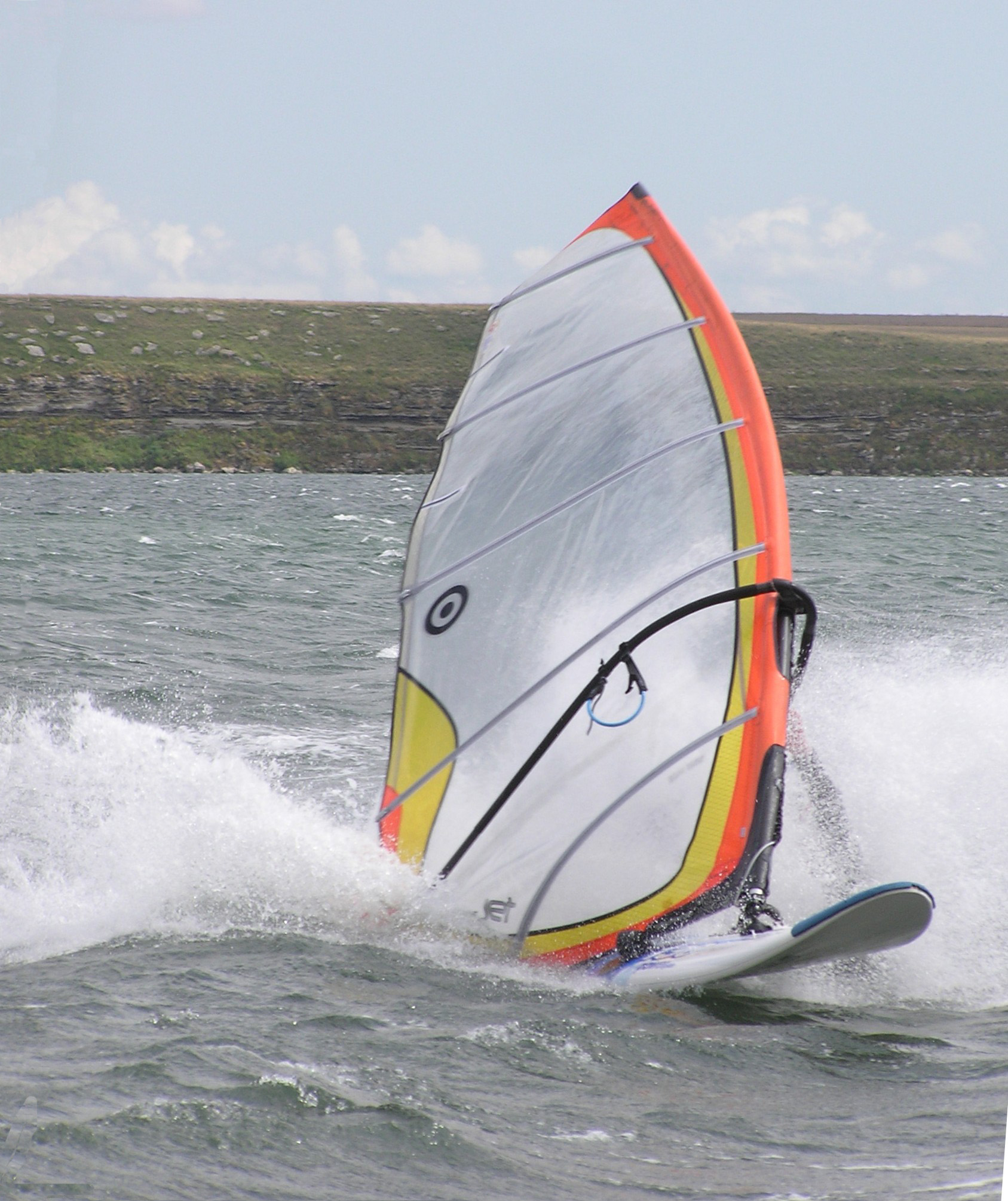 Донузлав, Чорноморський район, за межами населених пунктів Новоівановської і Красноярської сільських рад, Сакський район, за межами населених пунктів Веселовської сільської ради